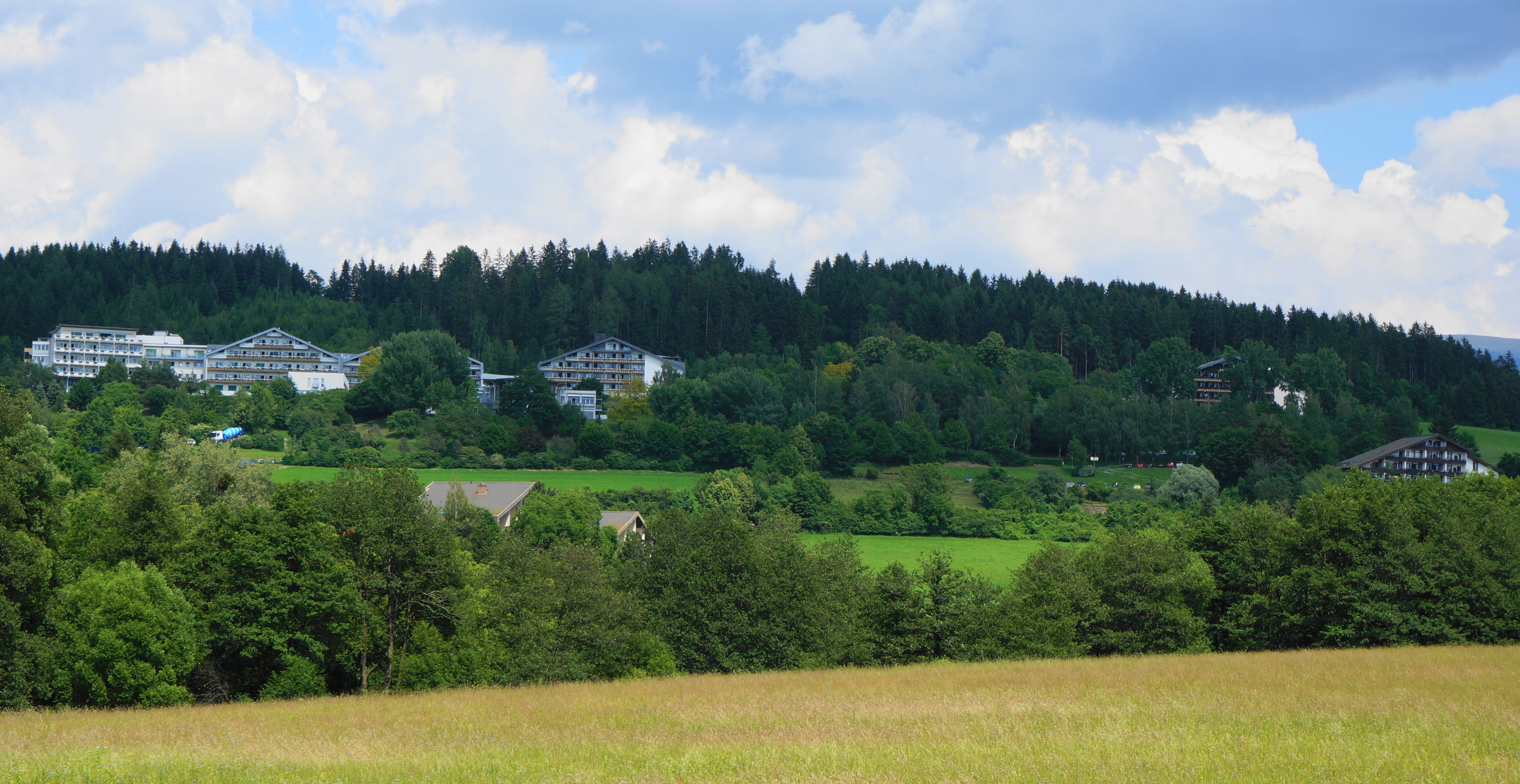 Althofen Kur- und Rehabitilationszentrum, Bezirk Sankt Veit an der Glan, Kärnten, Österreich, EU. Orthopädische Rehabilitation, Herz/Kreislauf, Dialyse, Sportmedizin, Lunge, Onkologische- und Stoffwechsel Rehabilitation.